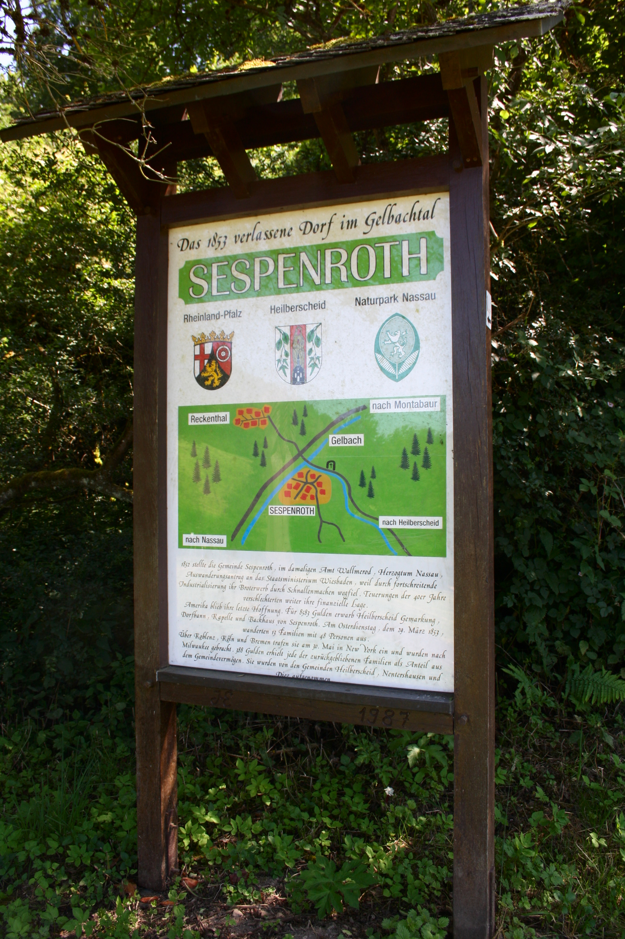 Hinweistafel Wüstung Sespenroth, Heilberscheid, Westerwald, Rheinland-Pfalz, Deutschland